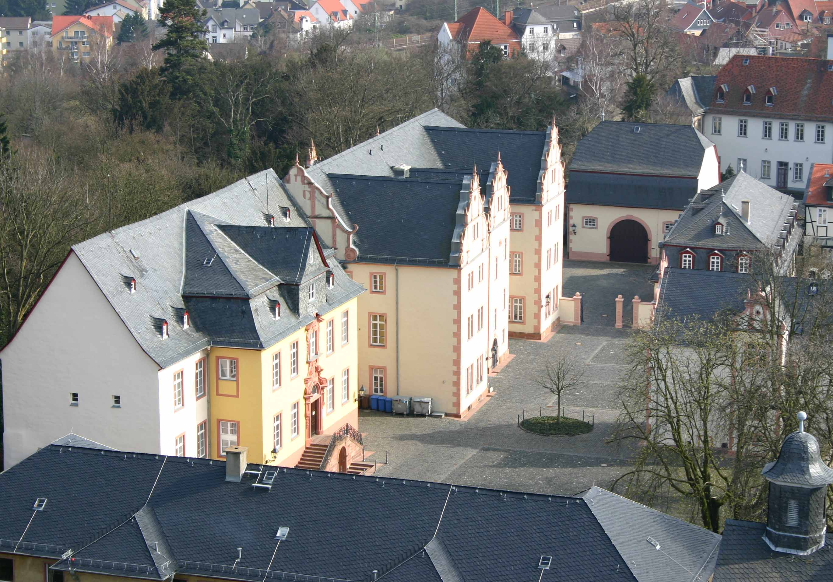 Beschreibung: Blick auf das Schloss vom Adolfsturm in Friedberg Quelle: selbst fotografiert am 27. März 2005 Fotograf: Sven Teschke Andere Versionen: Lizenzstatus: GNU FDL